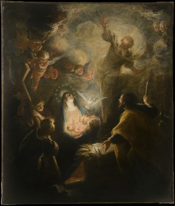 Natividad, óleo sobre lienzo, 140 x 120 cm, Londres, Galería Dereck Johns